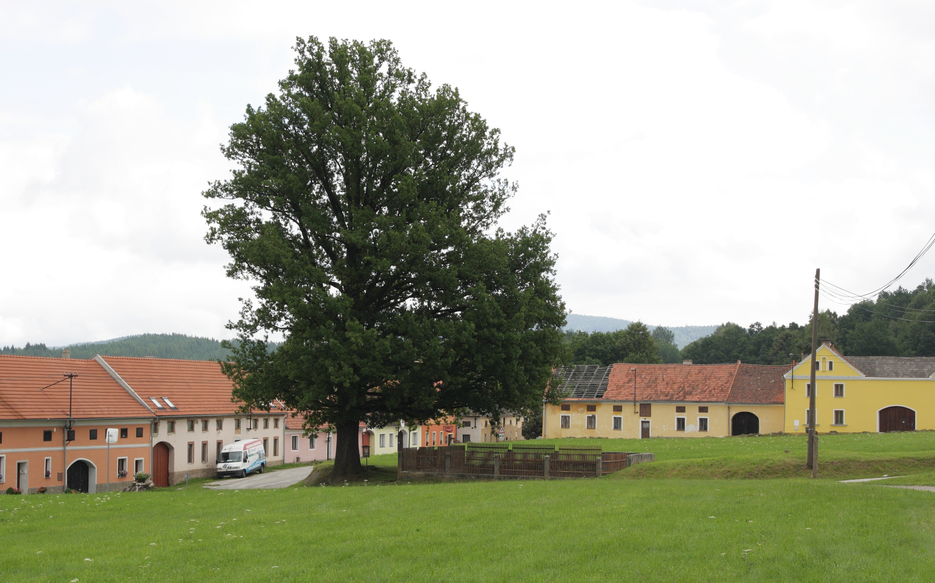 Blansko (Kaplice) - náves s památným stromem.